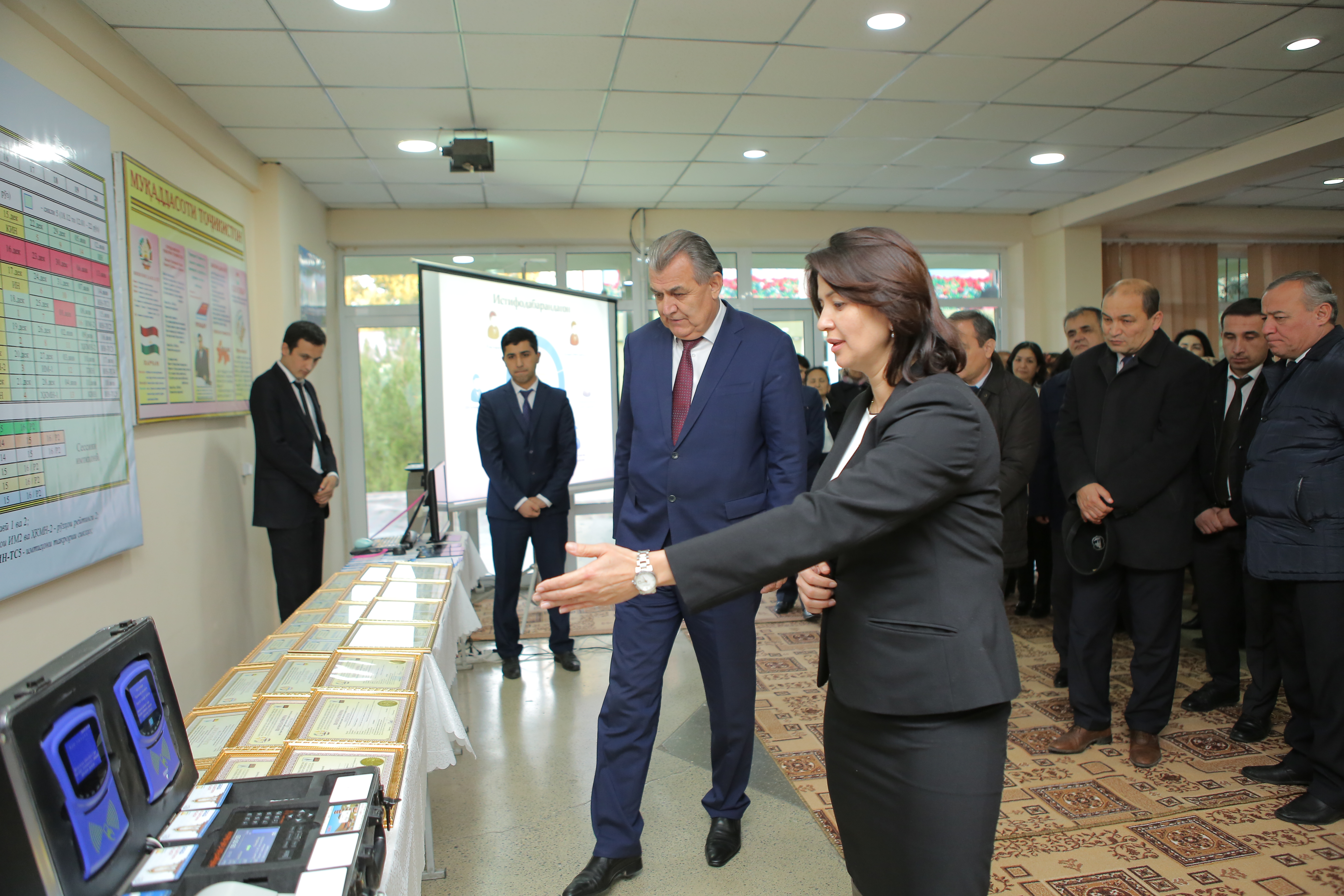 Директори донишкада номзади илмҳои техникӣ Саидӣ Дилафрӯз Раббизода қайд намуд, ки соли шашум аст, ки ин раванди таълим дар донишкада ҷараён дошта, аввалин хатмкунадагон бо дониши баланд пайи кору истеҳсолот ҳастанд.